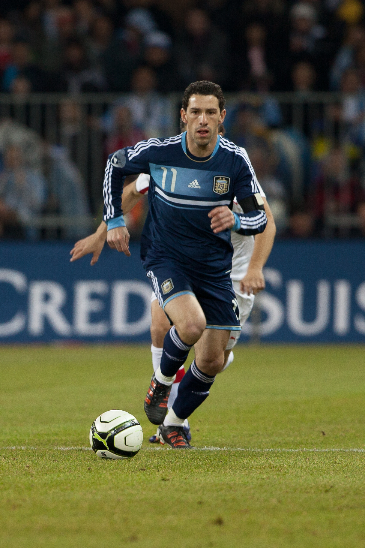 Maximiliano Rodriguez